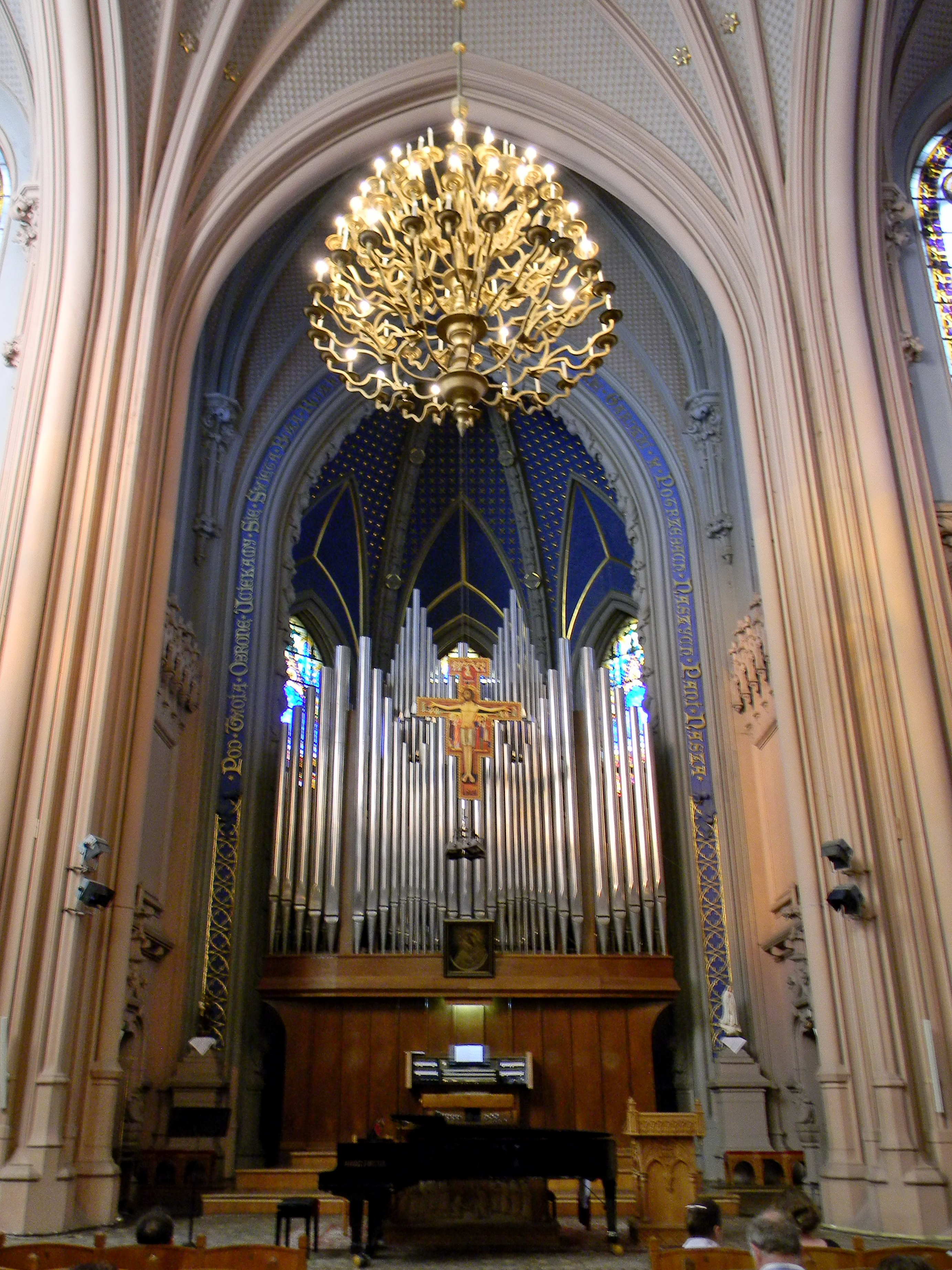 Костьол св. Миколая, Київ, Червоноармійська вул., 77